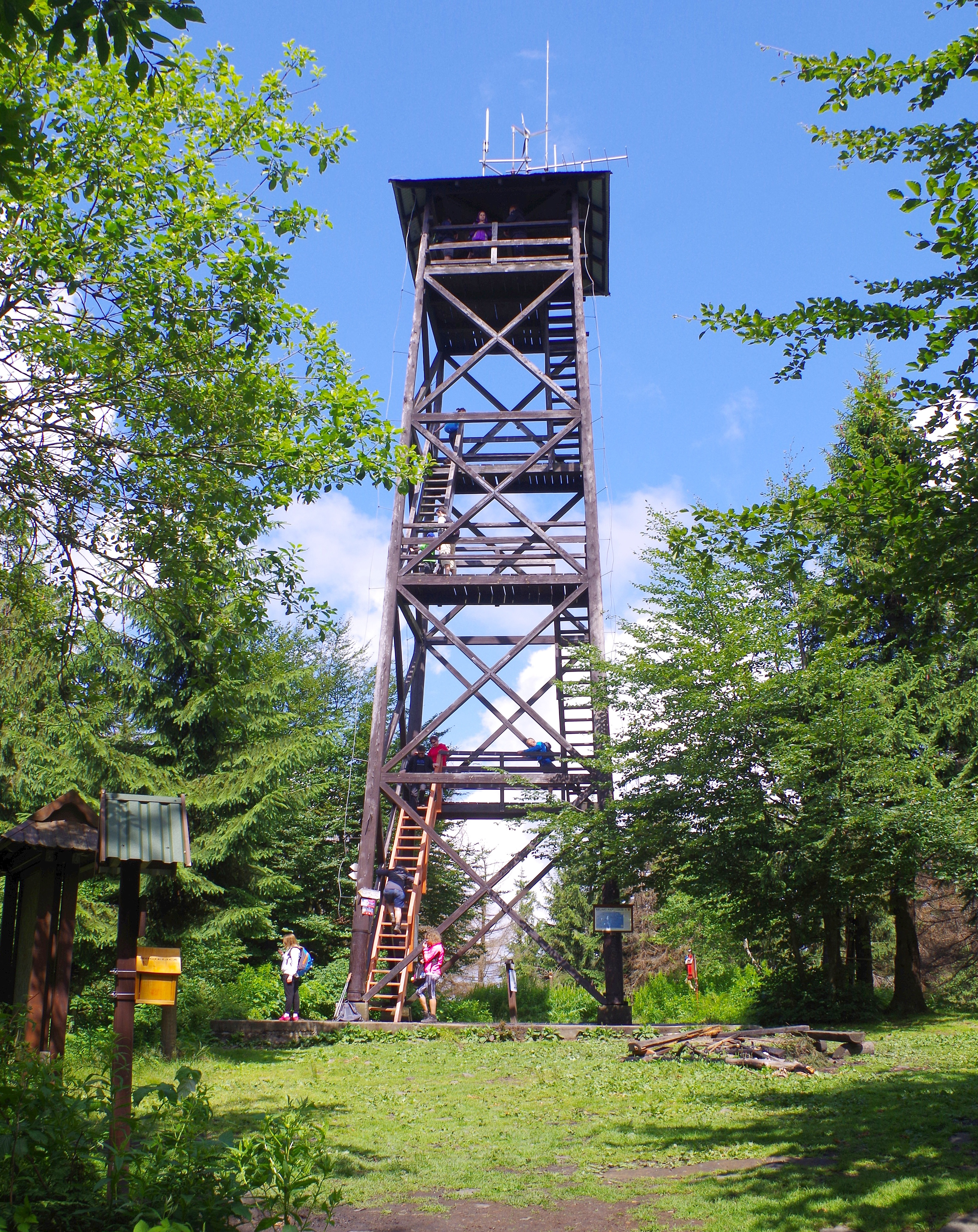 Wieża widokowa na Mogielicy